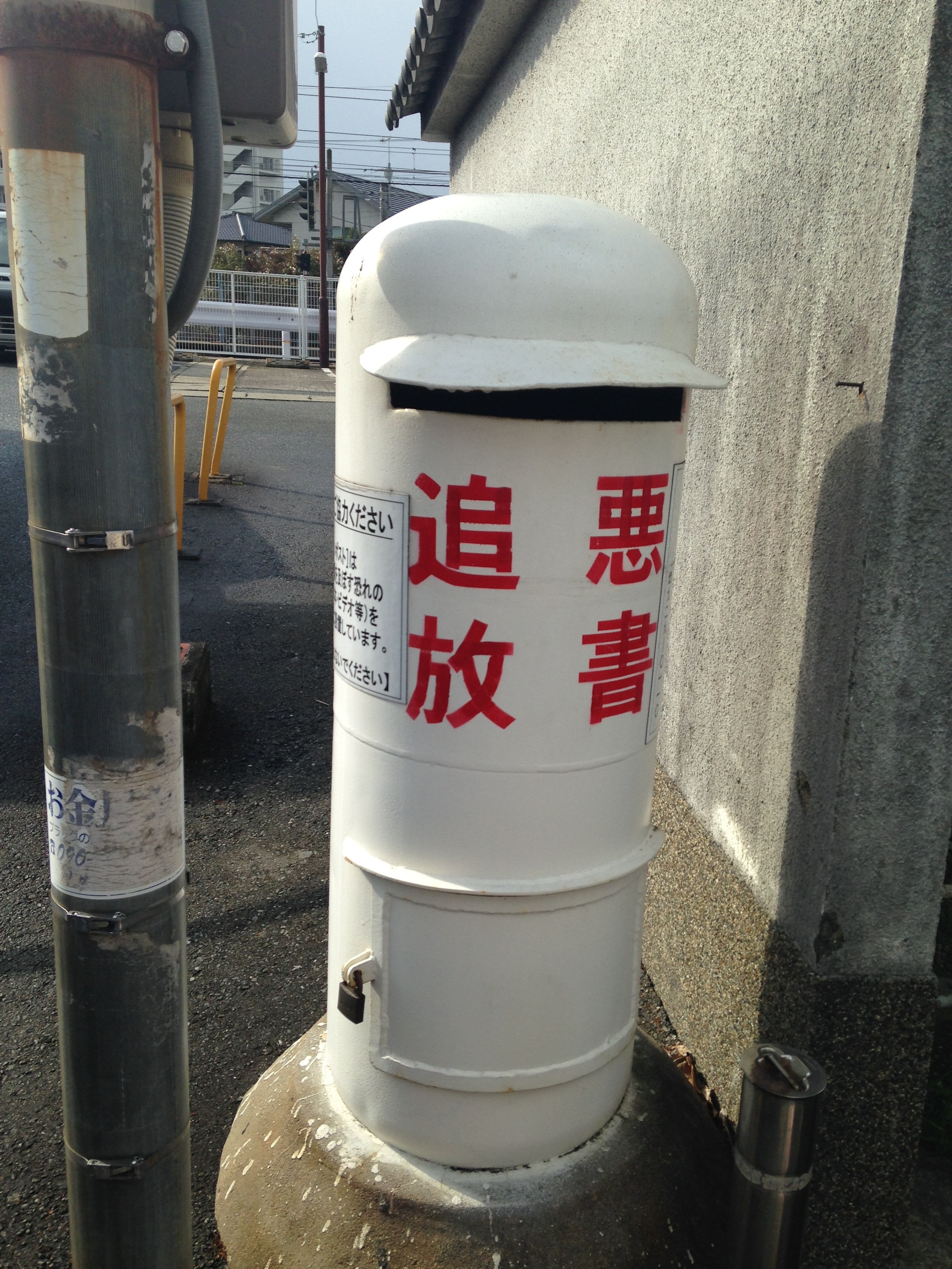 JR二日市駅前の悪書追放箱